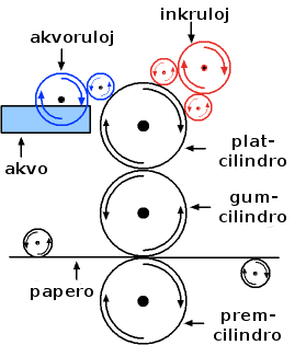 Esperanta versio – Esperanto version